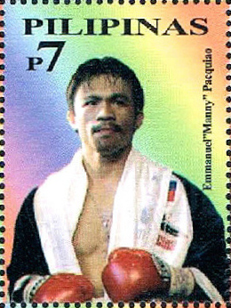 Manny "Pacman" Pacquiao